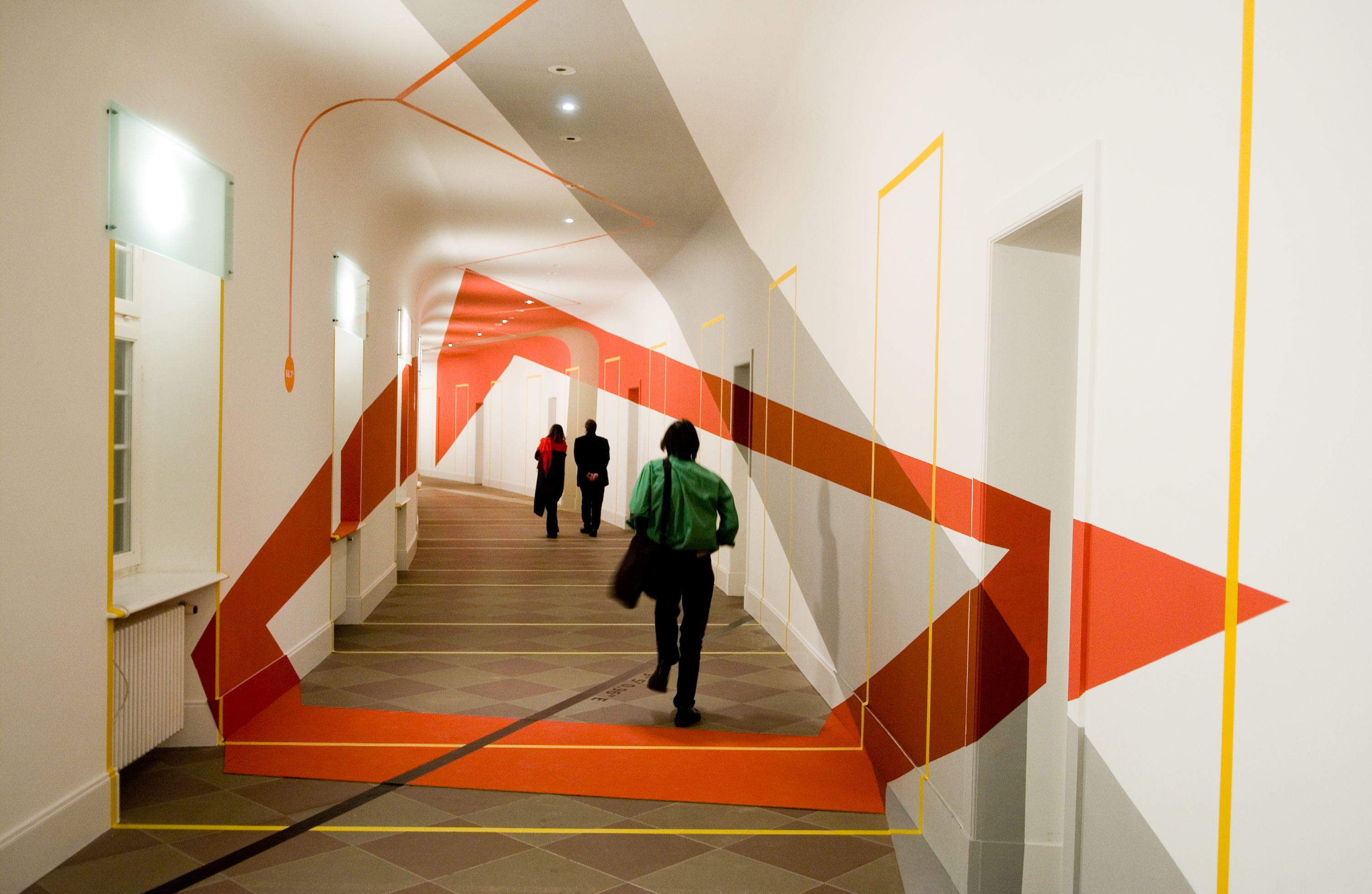 Oberer Hirschgang der Akademie Schloss Solitude